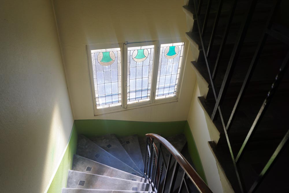 Montée d'escaliers de l'immeuble Cateland